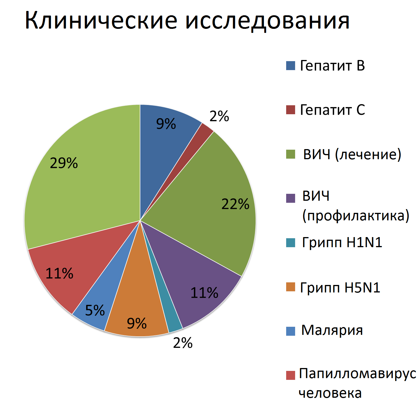 Клинические исследования ДНК-вакцин по состоянию на 2011 год